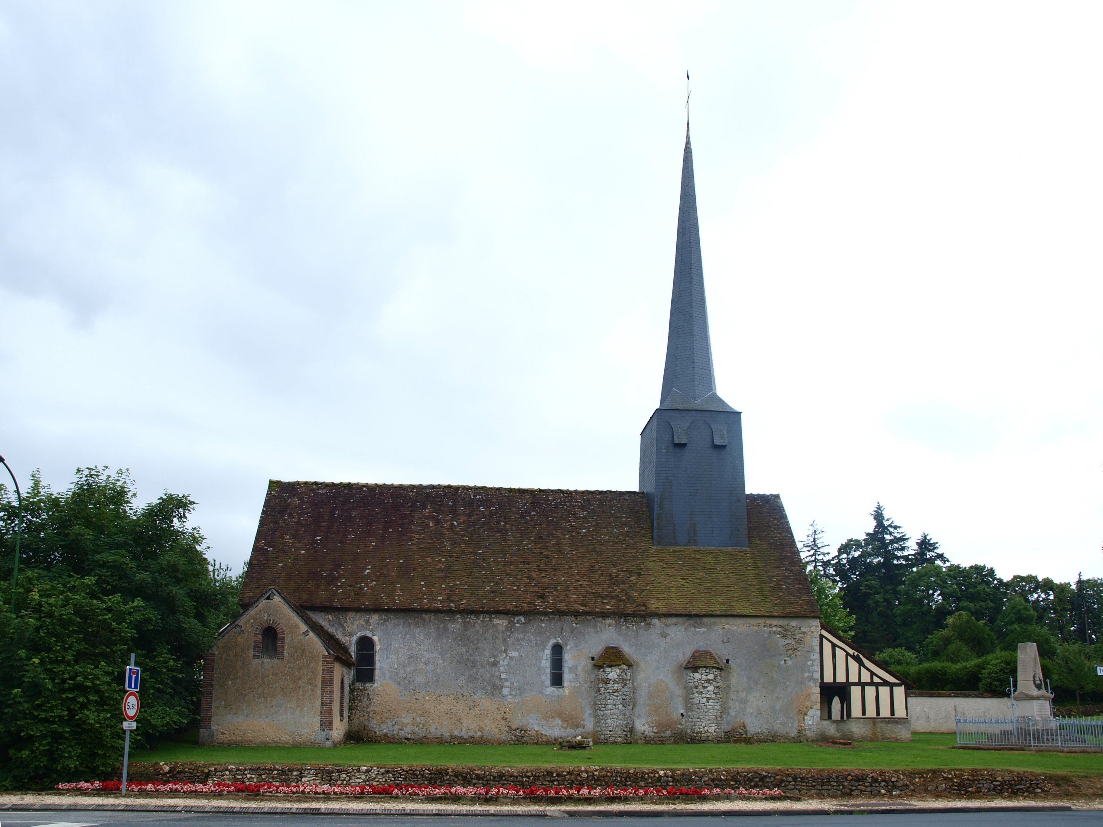 La Chapelle-Saint-Sépulcre (Loiret, France)